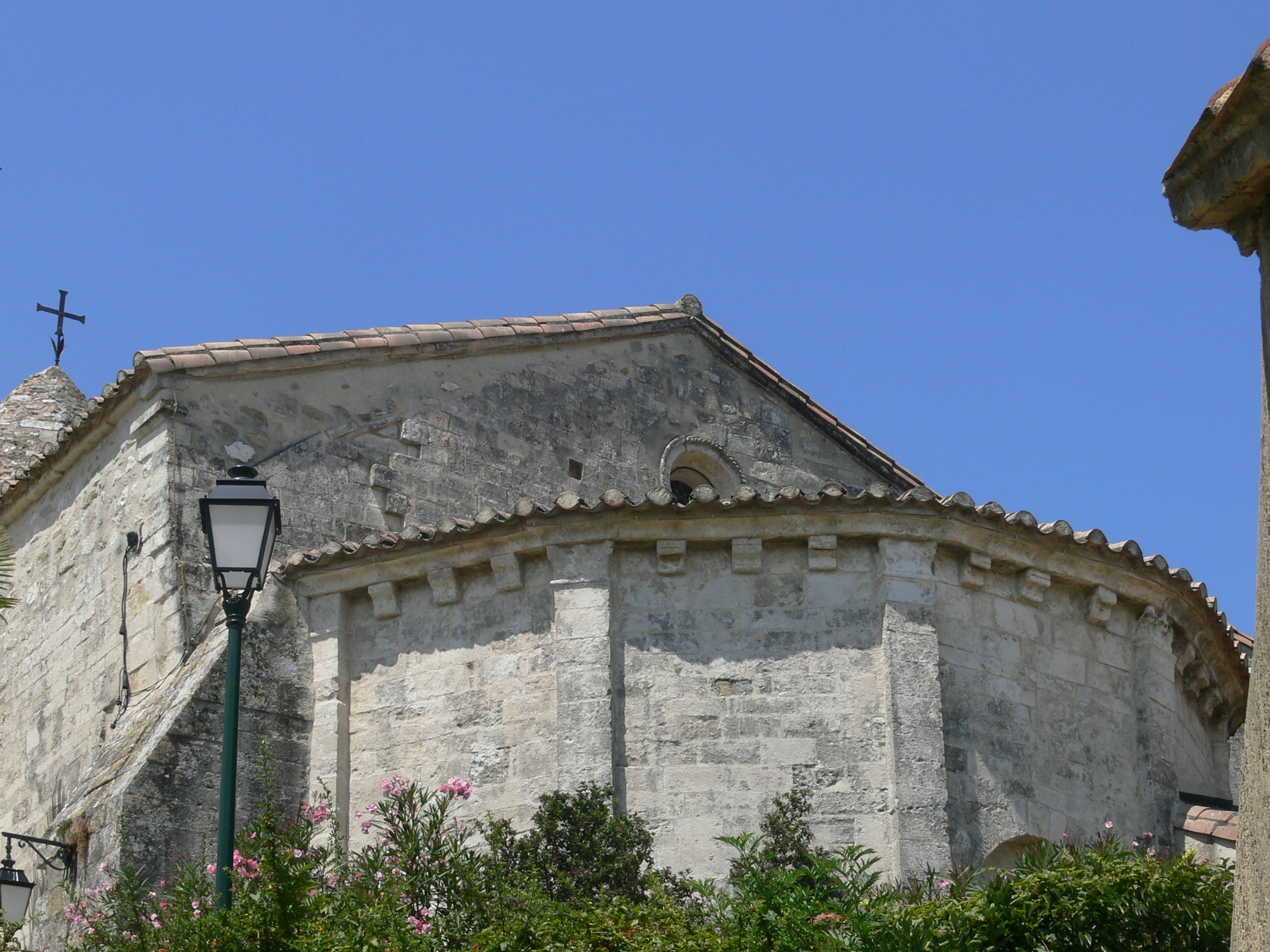 église Saint-Martin de Valaurie